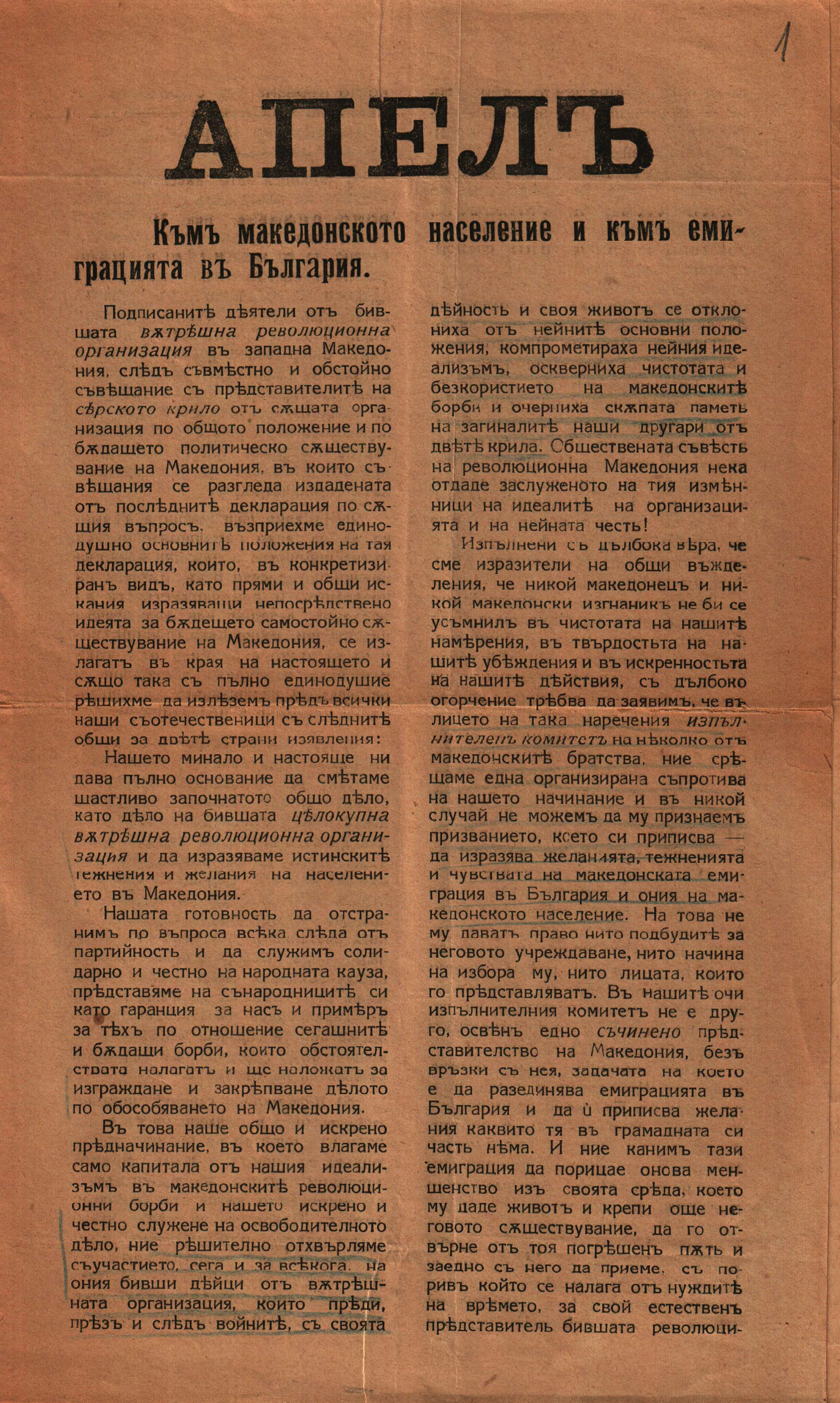 Апел към македонското население и към емиграцията в България